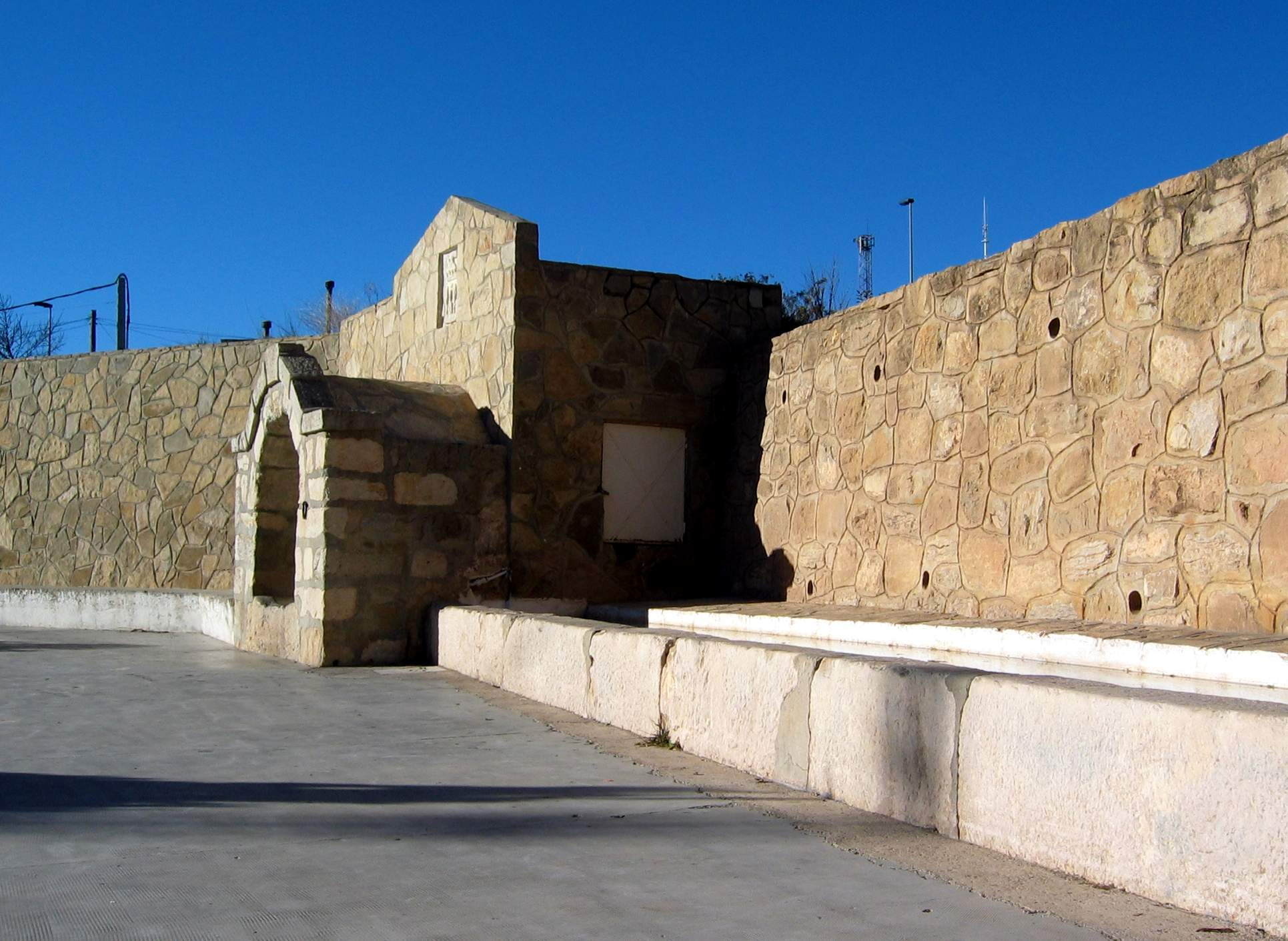 Vista de fuente con abrevadero en Titaguas (Valencia), año 1637. Siglo XVII.